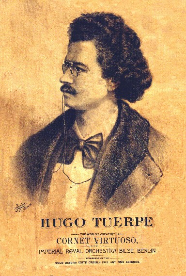 Beschreibung: Hugo Türpe Lithograph: Unbekannt. Die Lithographie ist signiert mit "The Gugler - Litho.Co. Milwaukee" (Verlagshaus und Lithographieanstalt), ca. 1881 Vom Stadtmuseum Burgstädt zur Restaurierung, Reproduktion und Veröffentlichung an André Teichmann abgegeben. Dieser stellt das Bild am 08.02.2005 gemeinfrei: "Das beiliegende Foto ist aus meinem Privatbesitz und ich stelle es gern rechtefrei hier zur Verfügung. Es ist eine Nachbearbeitung, die ich am Computer einer fast schon zerfallenen Reproduktion abringen konnte. Wasserflecken und Pilzbefall in Größenordnungen. Diese Reproduktion selbst wurde mir speziell zum Zwecke eben dieser Nachbearbeitung von unserem städtischen Museum überlassen. Es gilt als nachgewiesen, dass bereits die im Burgstädter Anzeiger 1924 veröffentlichte s/w-Zeichnung (von B. Gürtler) auf dieser alten Reproduktion fußt, die seinerzeit in einem Tanzlokal gehangen haben soll. Graue Geschichte eben. Beide, die desolate Reproduktion und auch die Strichzeichnung finden sich auf den Seiten Herzliche Grüße André Teichmann 08.02.2005"